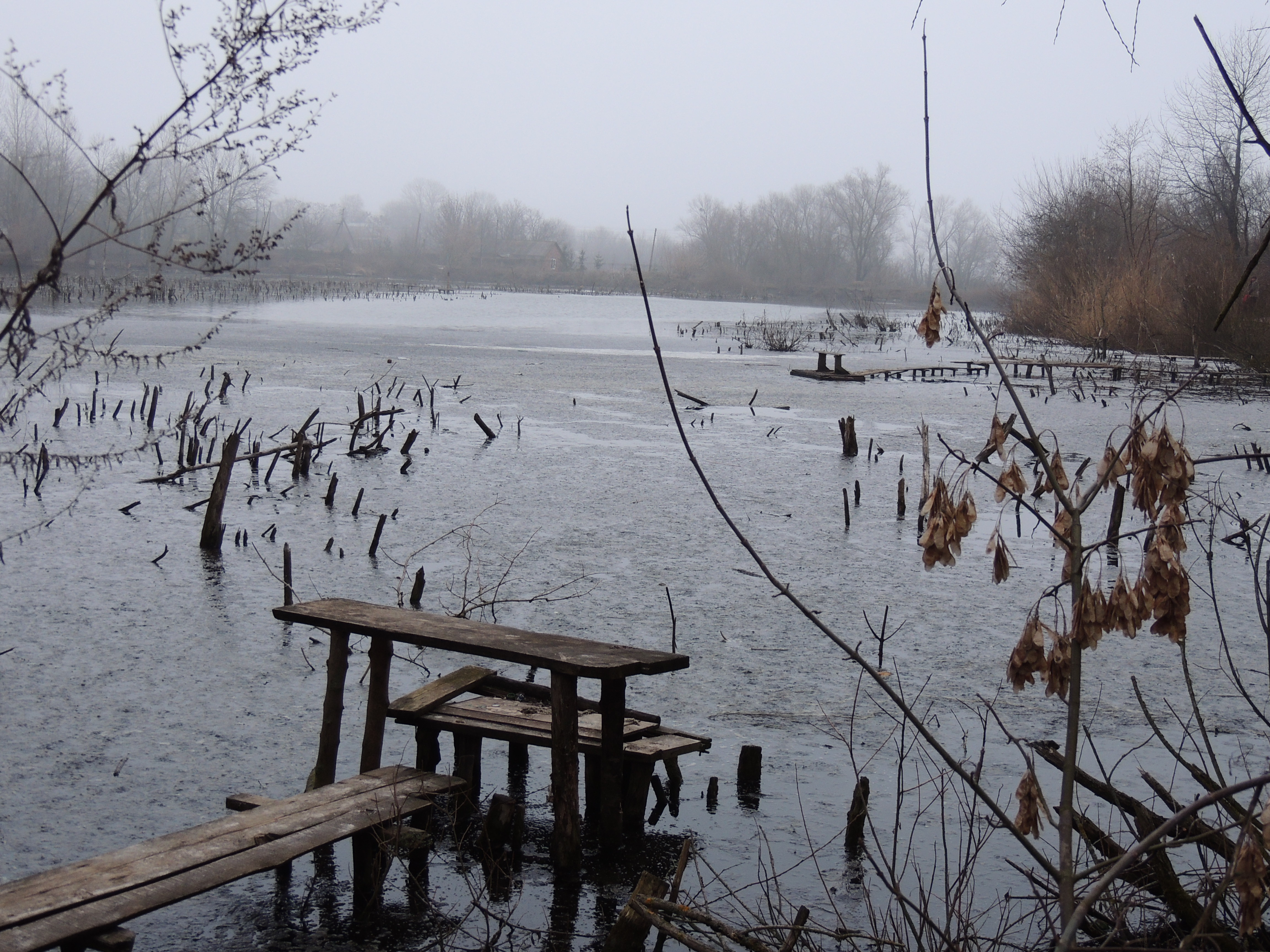 Це фото.